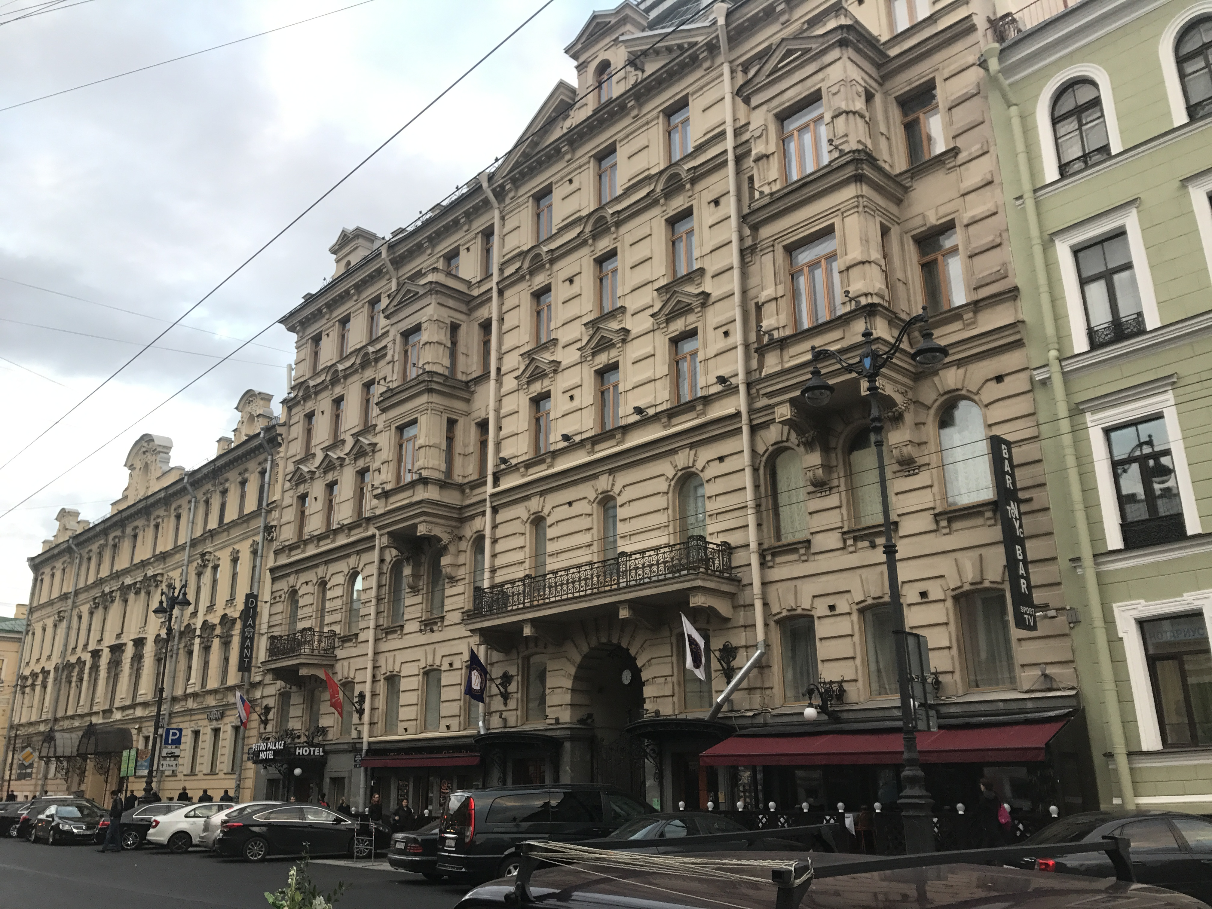 Торговый дом 'Братья Шталь'. Дом, в котором В.И. Ленин в 1905 г. участвовал в заседании Исполнительного комитета Петербургского Совета рабочих депутатов: Малая Морская улица, 14, Адмиралтейский район, Санкт-Петербург